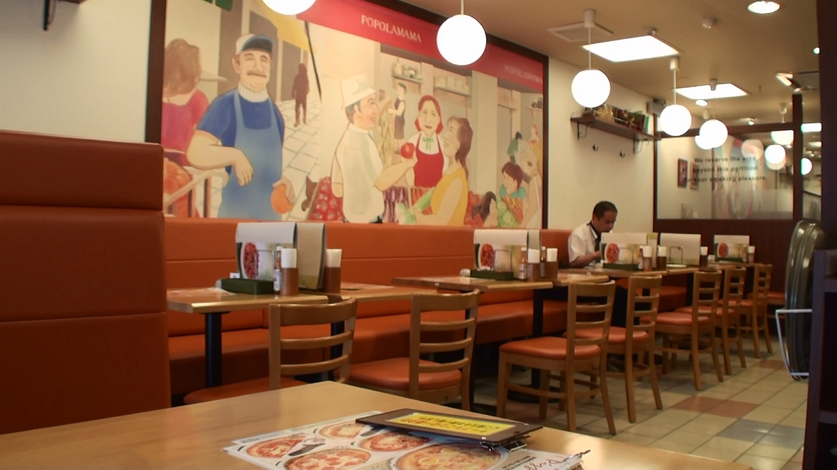 ポポラマーマ店内（立花店・閉店）